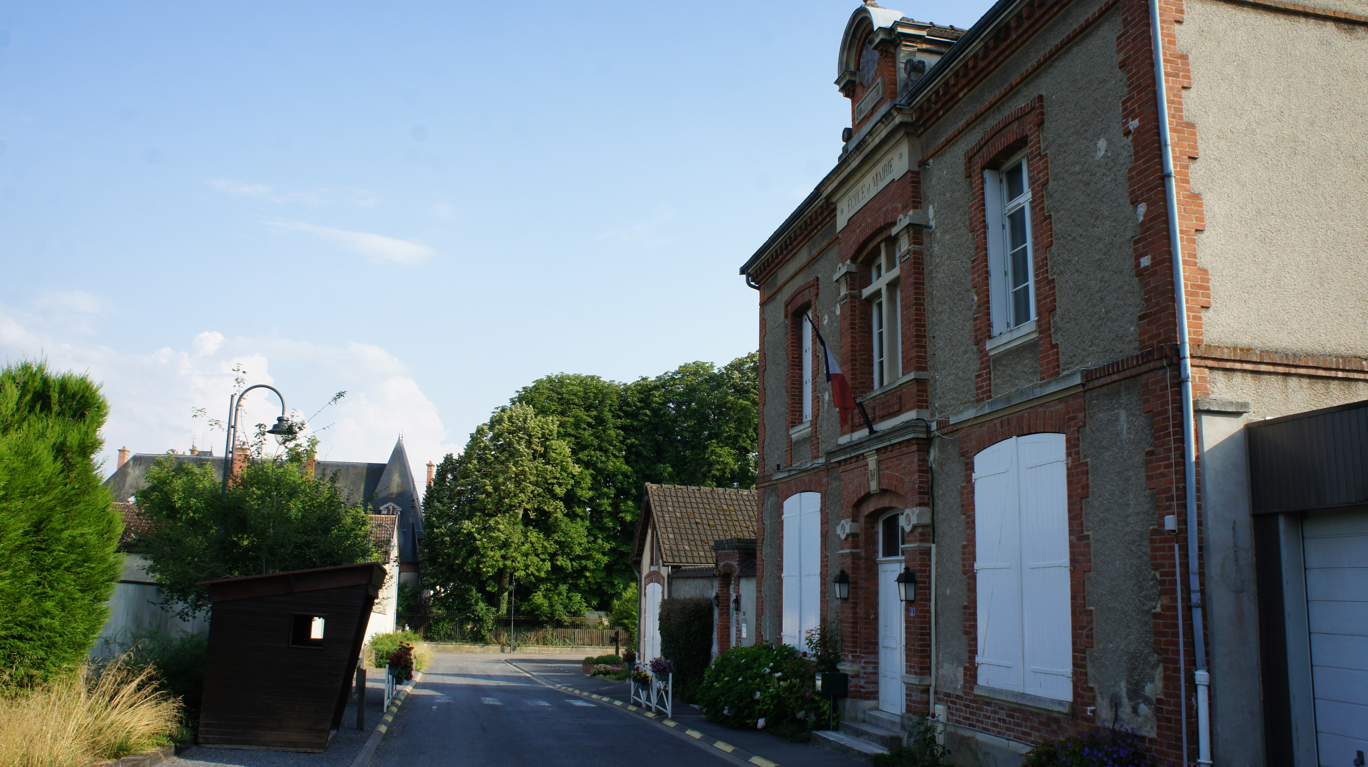 Une vue de .